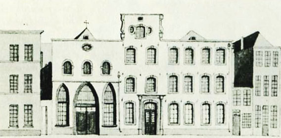 Hospital Hl. Geist (auch Heiliggeisthaus) Köln, Domhof vor 1840. Ostansicht nach einem Aquarell von Wirtz. Das Gelände wurde zum späteren Bauplatz des Dom-Hotels